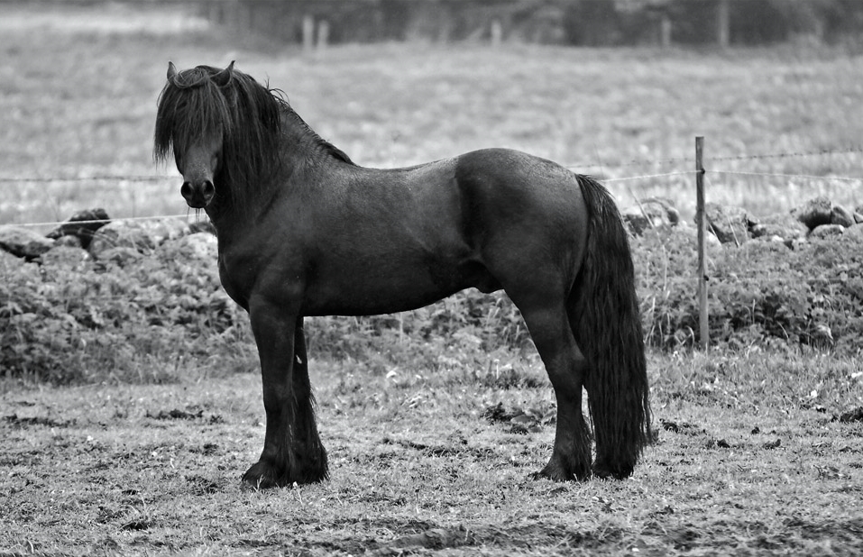 Nordsvensk - hingst